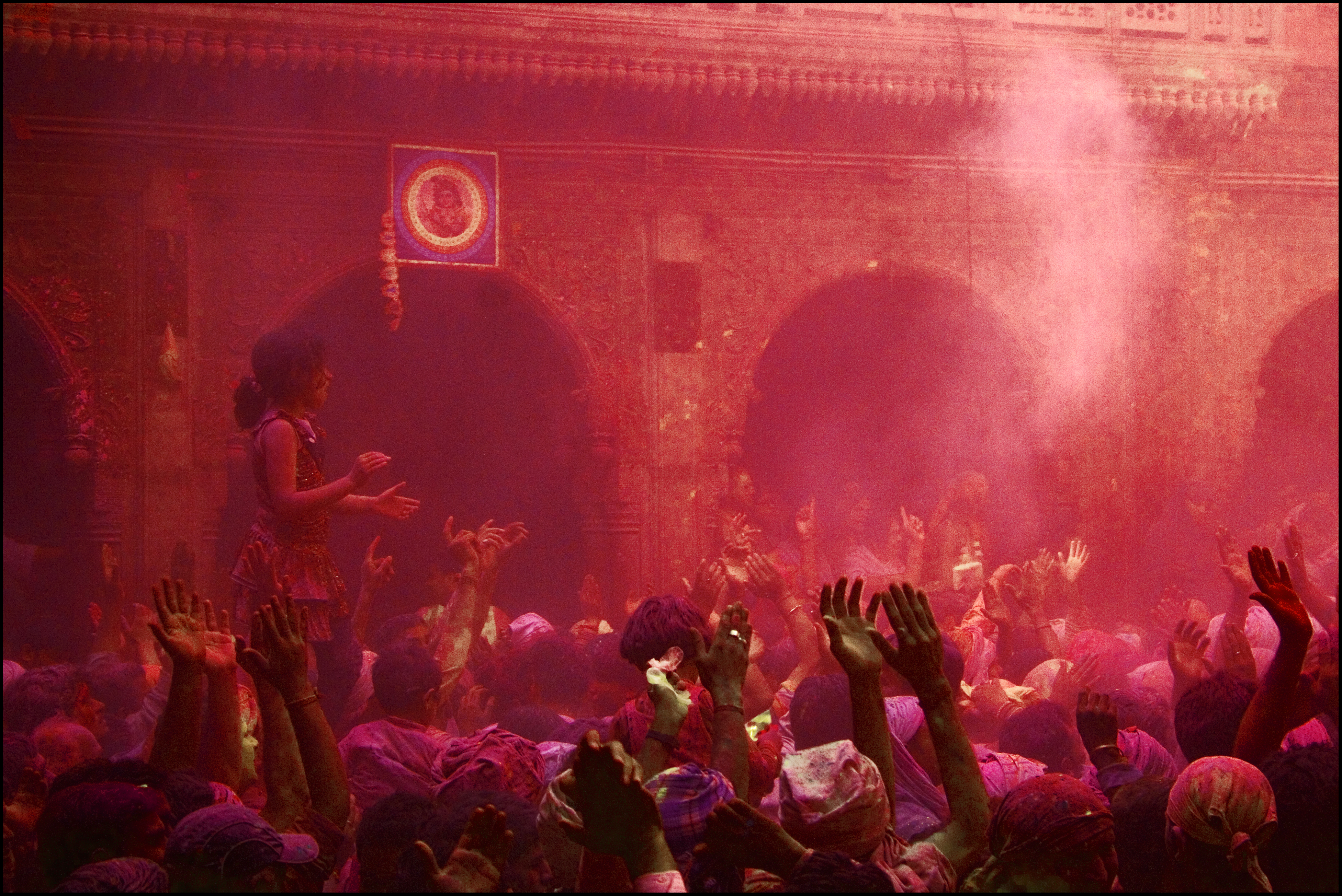 Holi at Banke Bihari Temple, Vrindavan